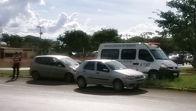 Juizado Especial de Trânsito (itinerante) em atuação em Brasília, DF, Brasil. Faz parte do Juizado Especial Cível no DF.